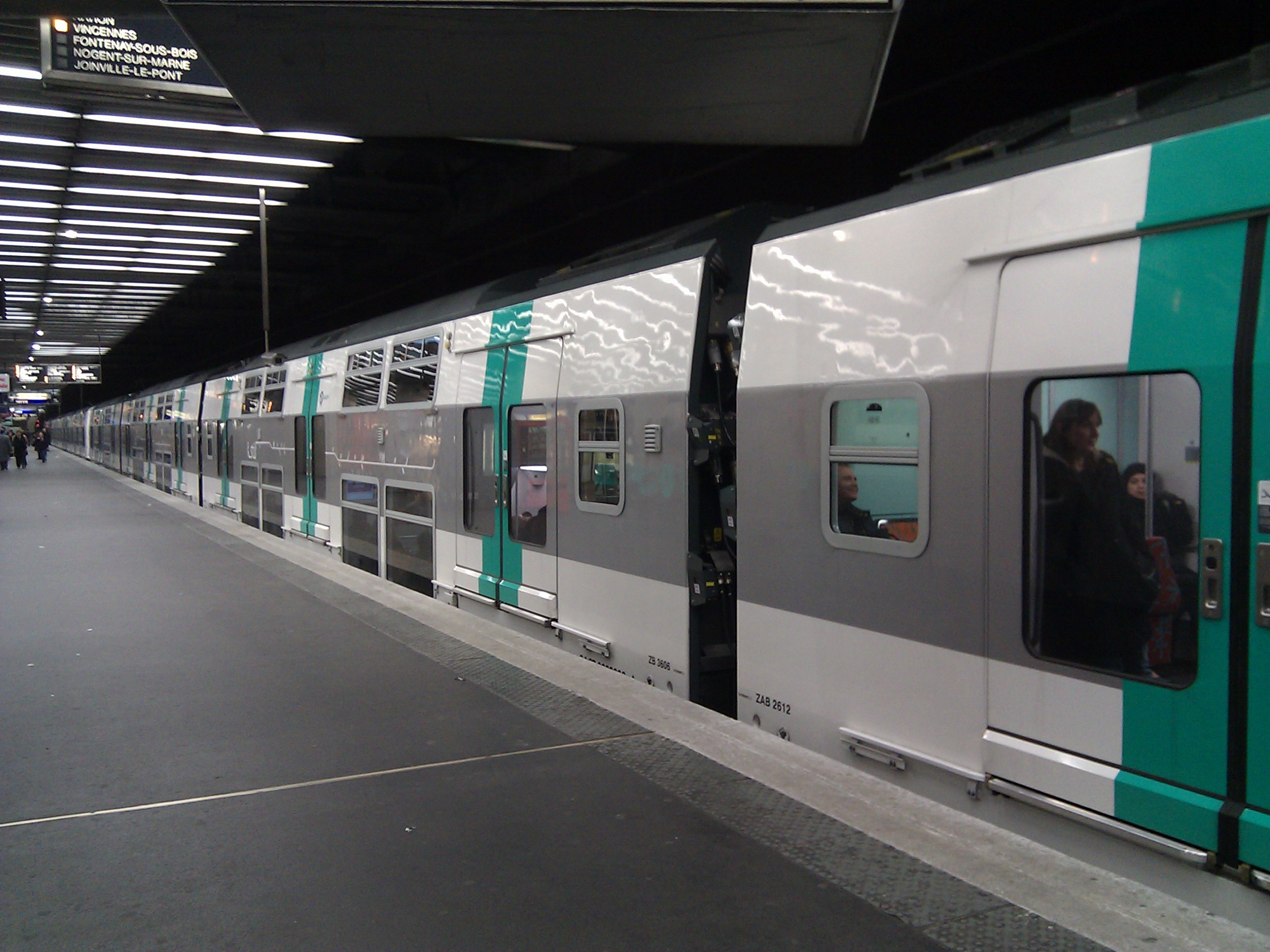 Vue extérieure d'un MI09